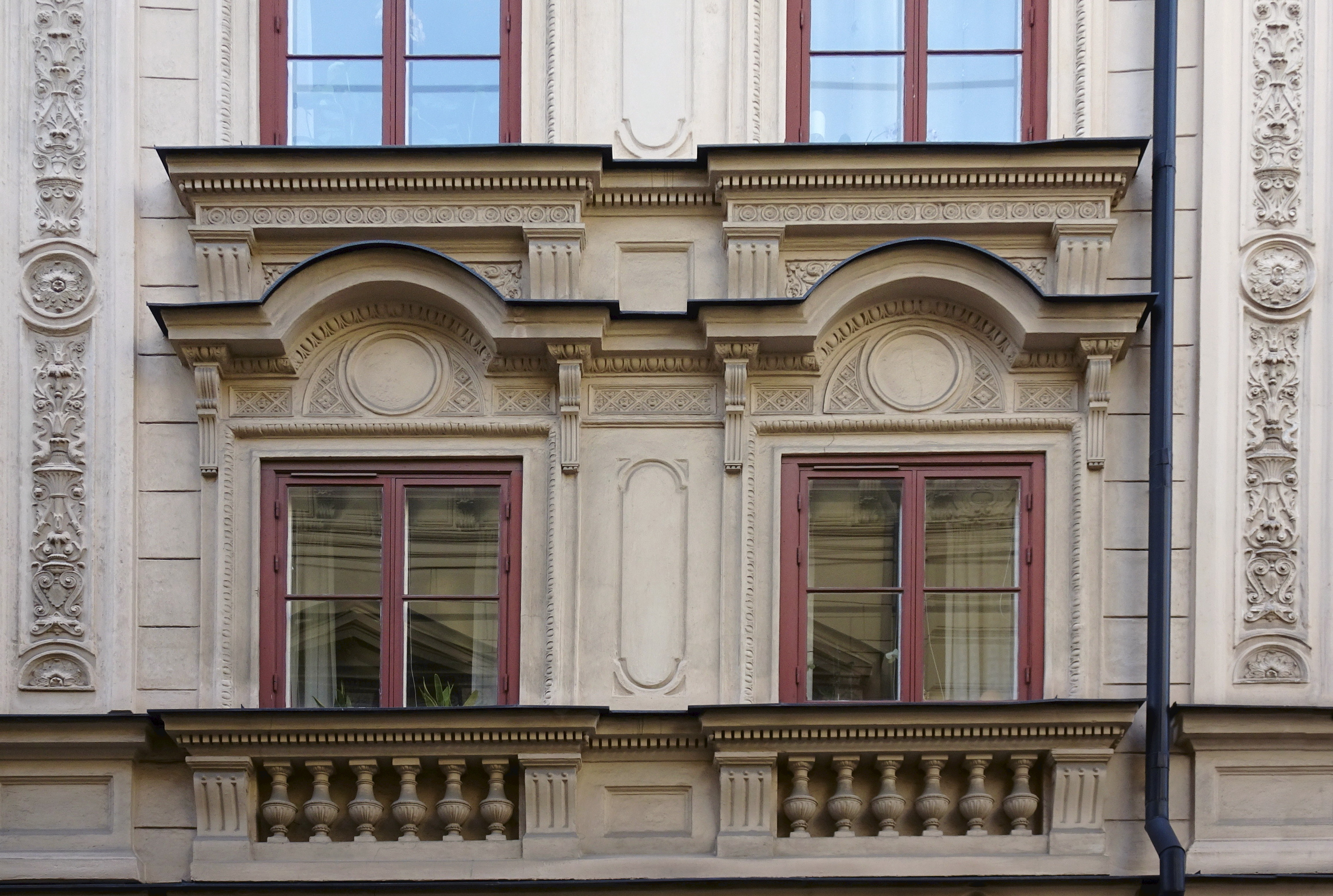 Iason 1, Lilla Nygatan 18